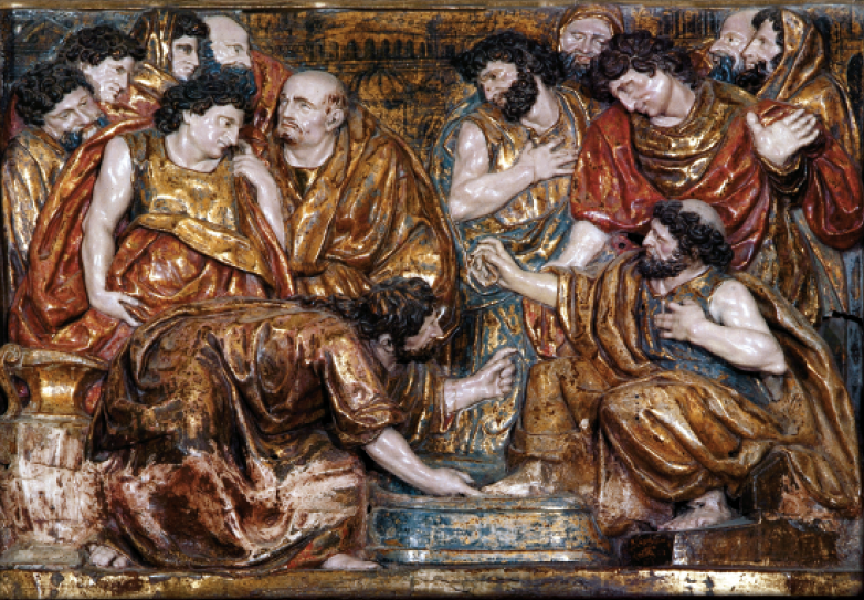 Etxarrentxuloko elizako erretaularen xehetasuna